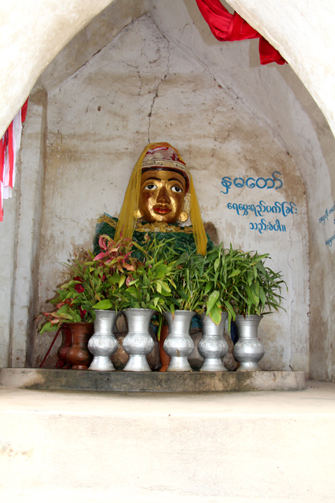 မြန်မာဘာသာ: သရပါတံခါးဘေးရှိ နှမတော် နတ်ကွန်း